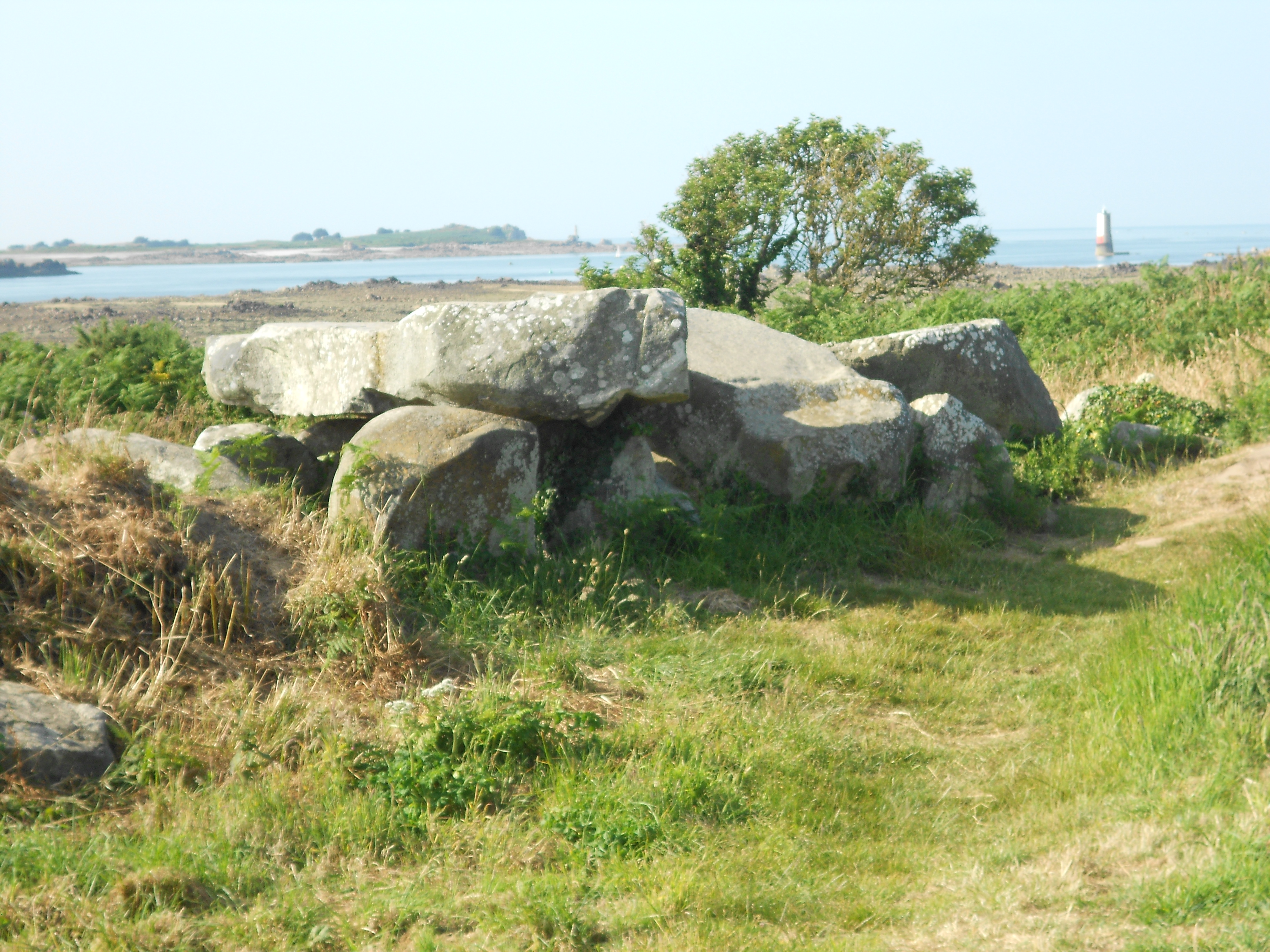 Epoque néolithique. Située en bord de mer à Kerbors.